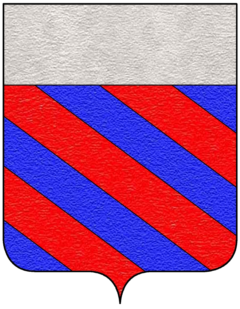 Stemma della famiglia Buzignola